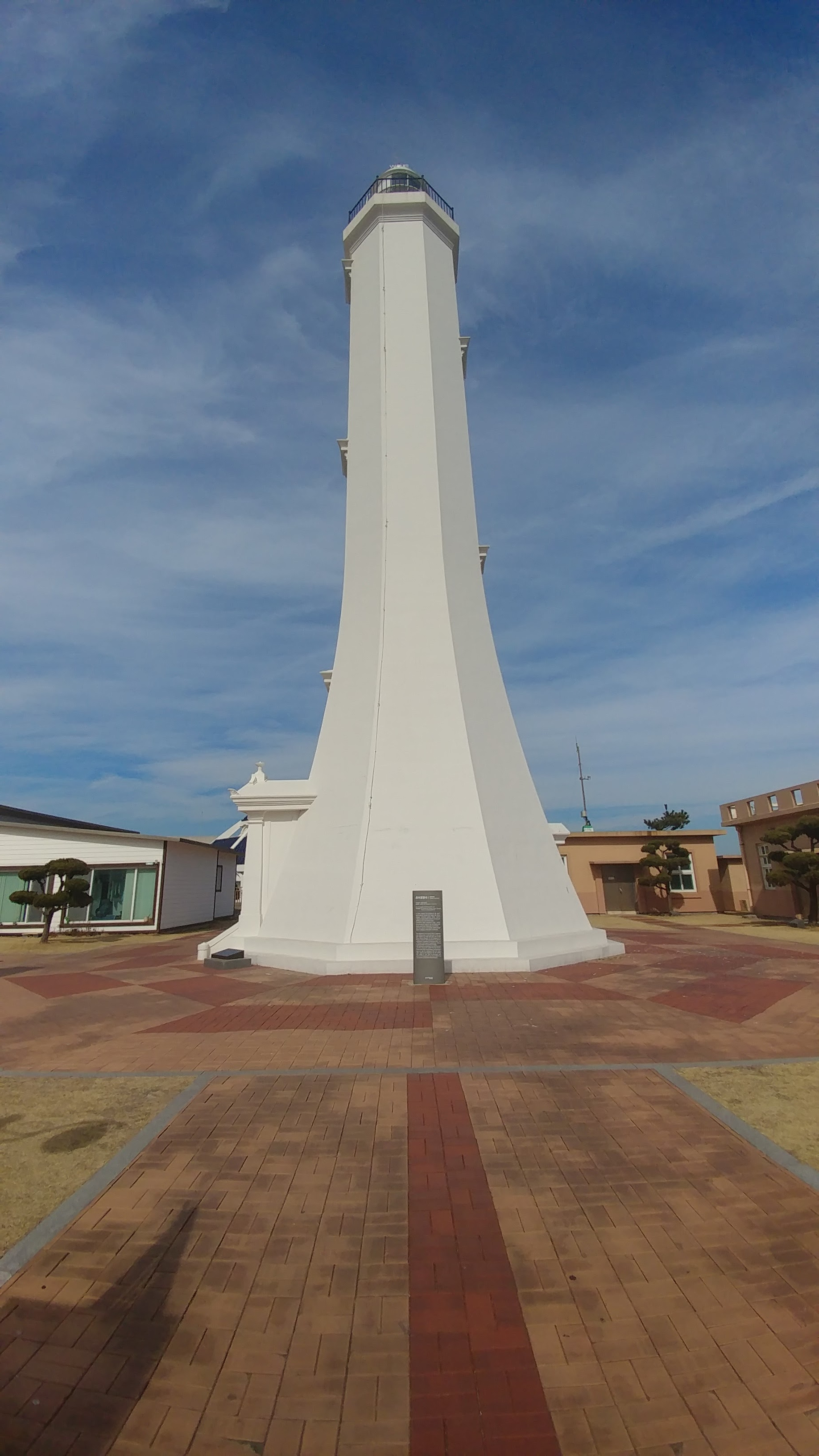 호미곶 등대